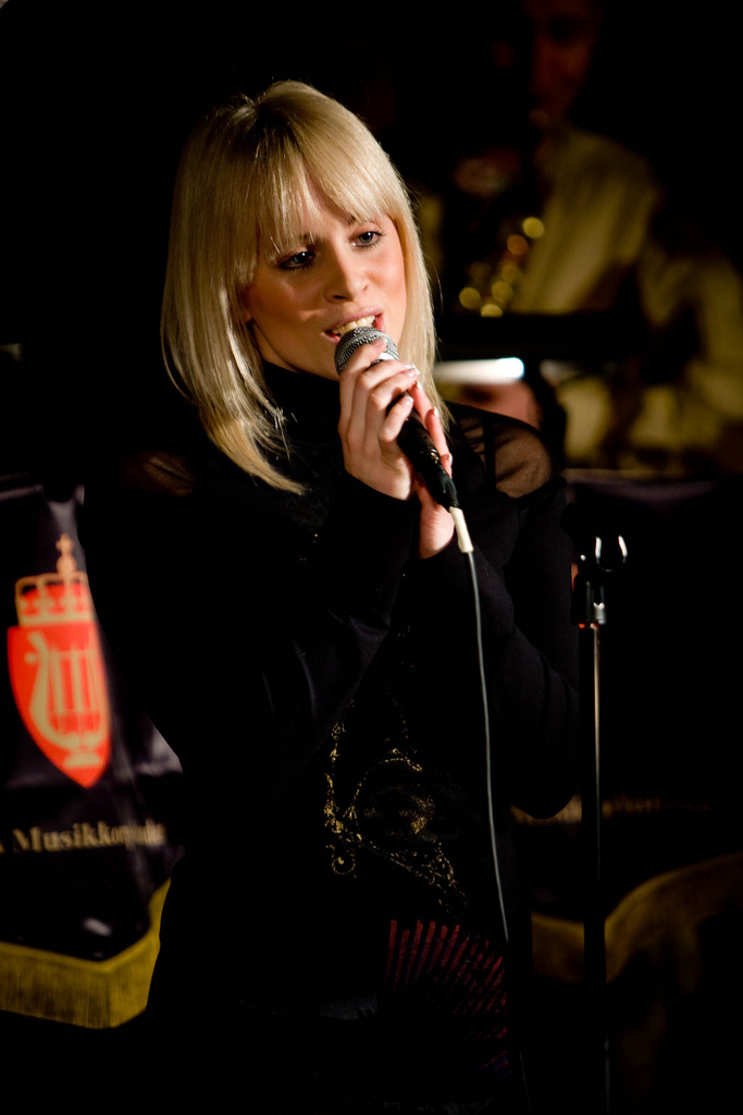 Soloist Christine Gulbrandsen